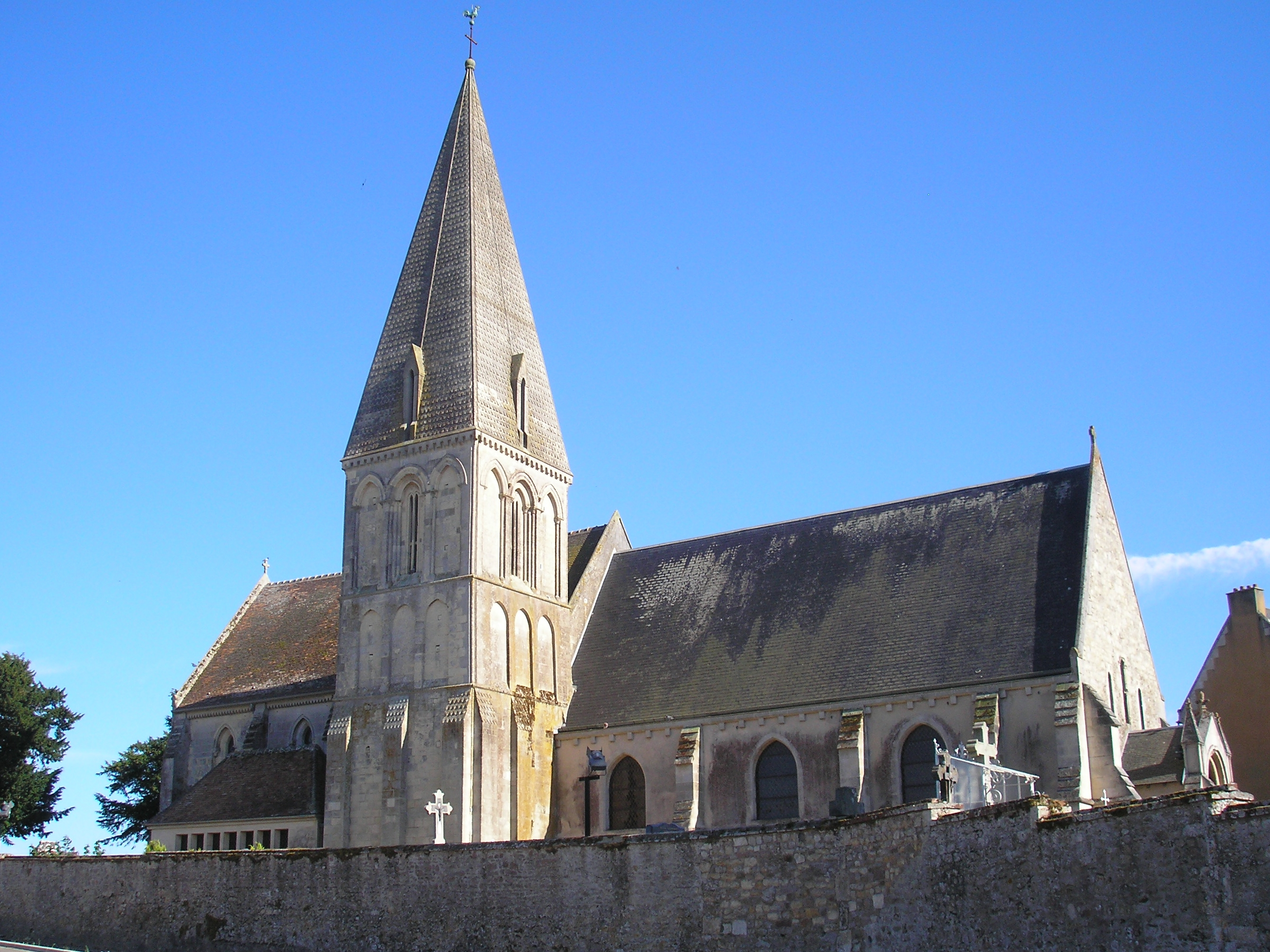 Baron-sur-Odon (Normandie, France). L'église Notre-Dame-de-la-Nativité.